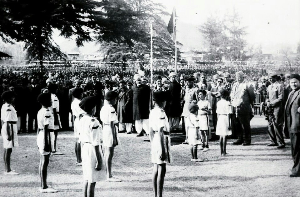 1950جناح باغ میں لیاقت علی خان کا استقبال کرتے ہوئے۔تصویر میں جلال بابا، عبدالقیوم خان،فقیرا خان اور مولانا عبدالغنی موجود ہیں۔